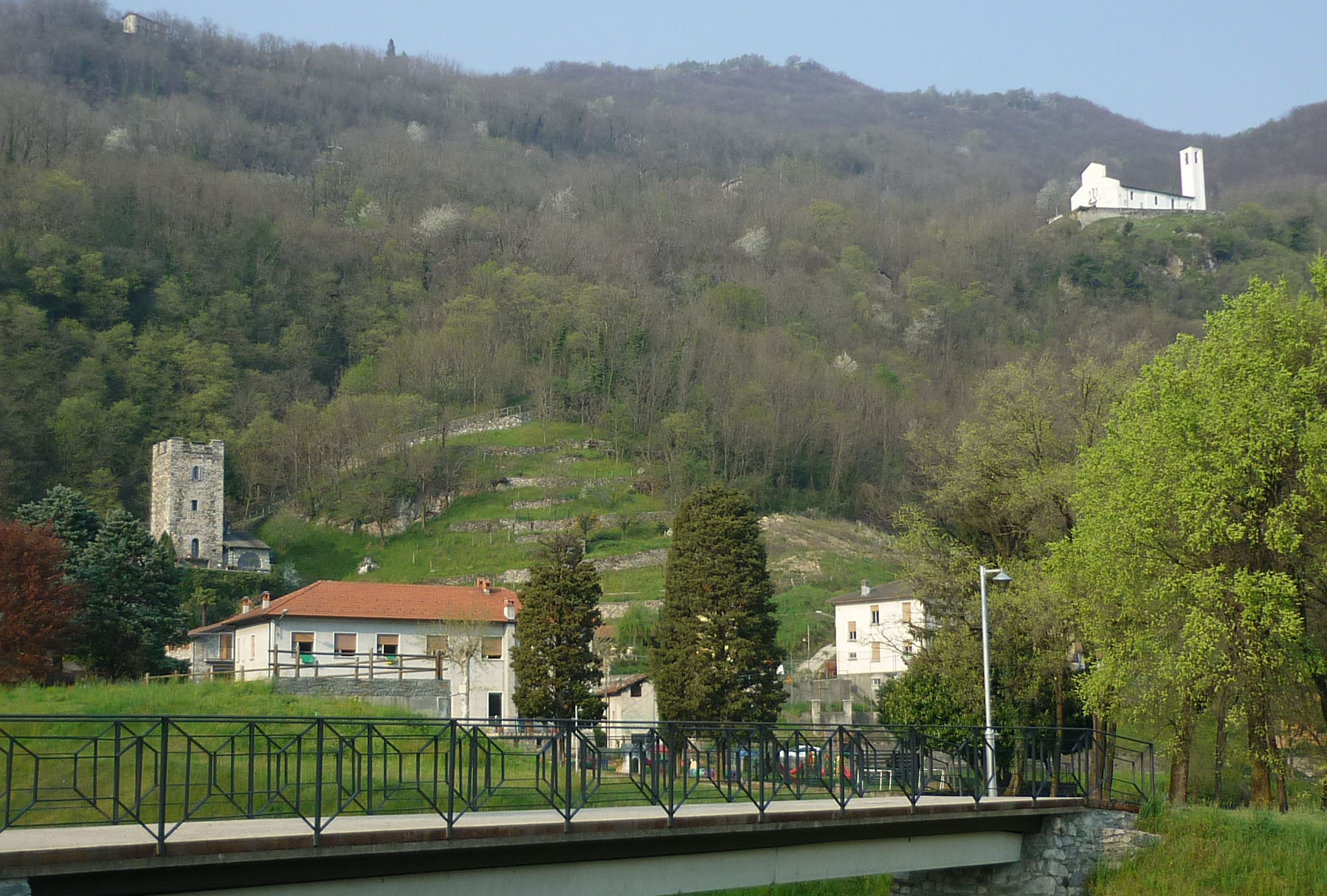 Wallfahrtskirche San Miro oberhalb von Sorico am Comer See